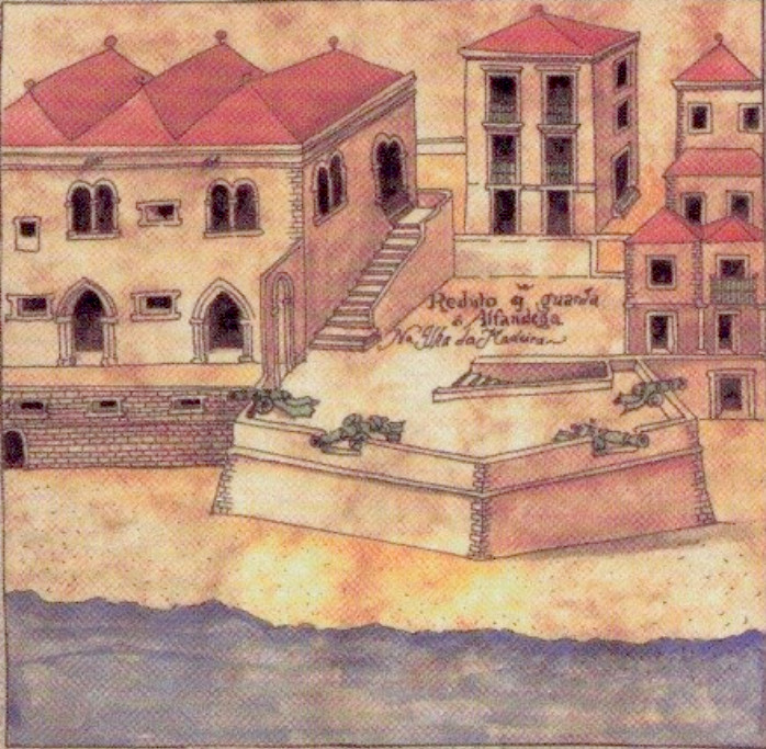 Detalhe em aguarela de Max Römer (décadas de 1940-1950), reprodução de detalhe de desenho aguarelado de Bartolomeu João ("Carta da Madeira", 1654).